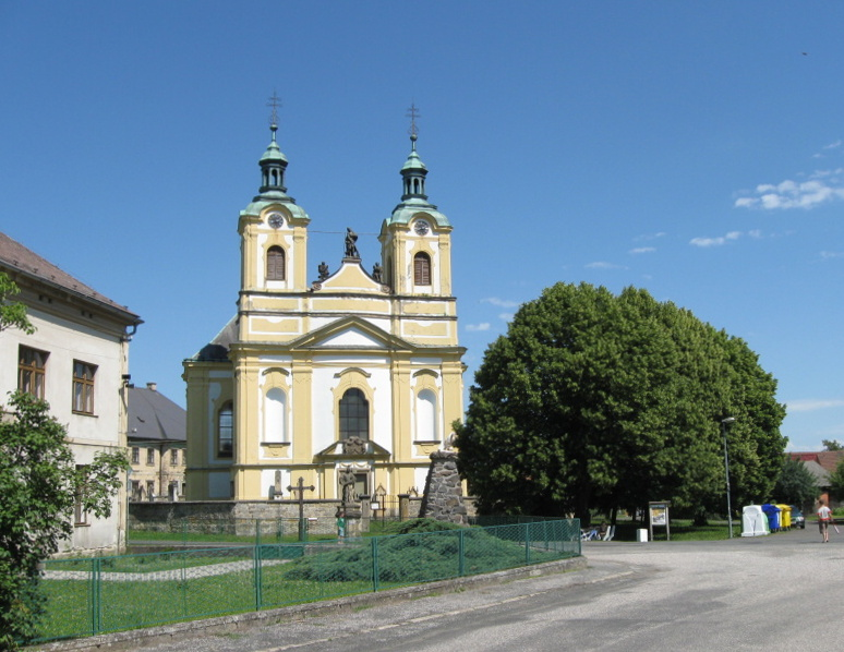 Kostel Povýšení sv. Kříže (Ostružno), Ostružno